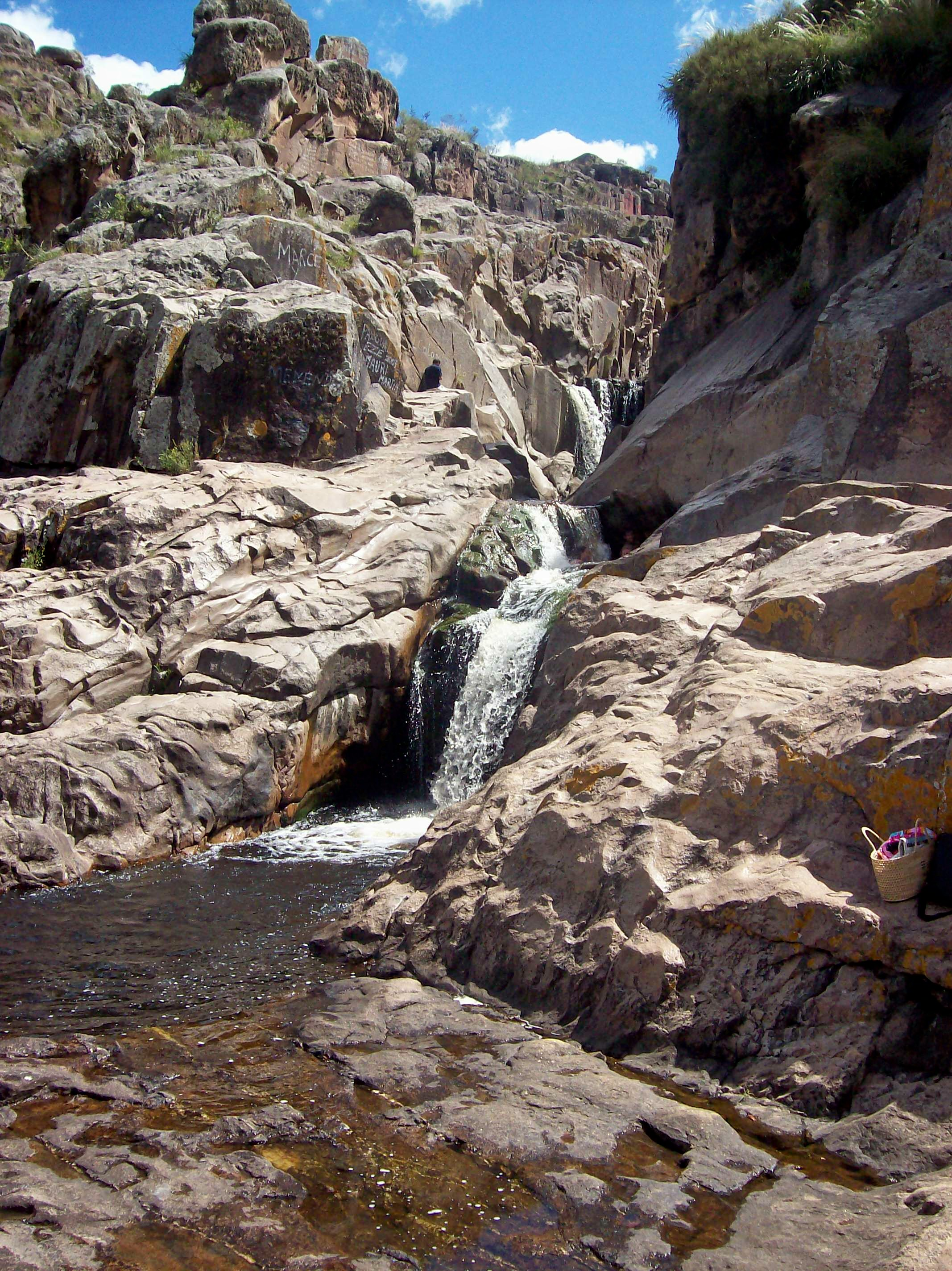 Cascada de Olaen en las afueras de Valle Hermoso, pcia. de Córdoba, Argentina.